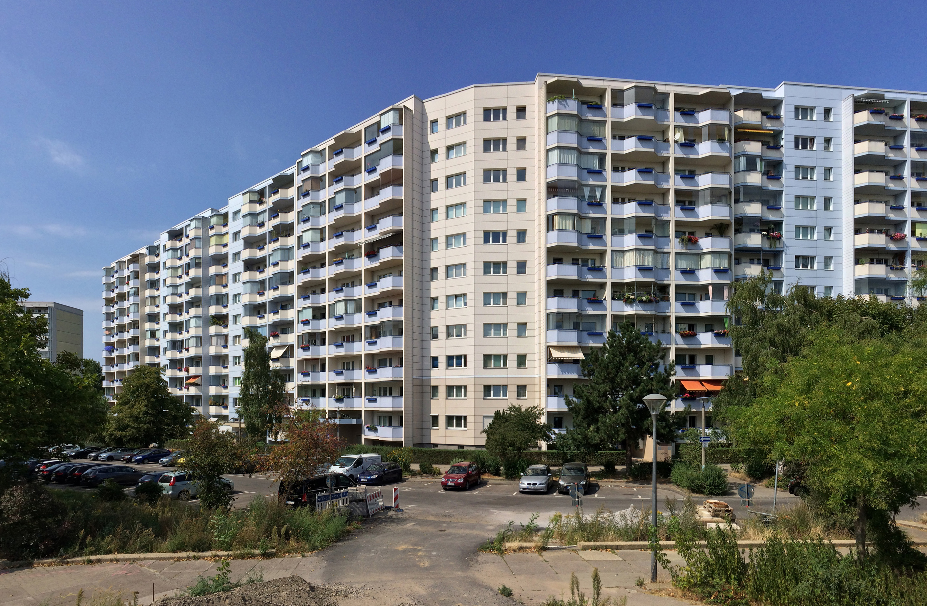 Wohnbebauung Franz-Stenzer-Straße, Marzahner Promenade, Wohngebiet 3, Berlin-Marzahn, 1980er Jahre, Plattenbau-Typ WBS-70